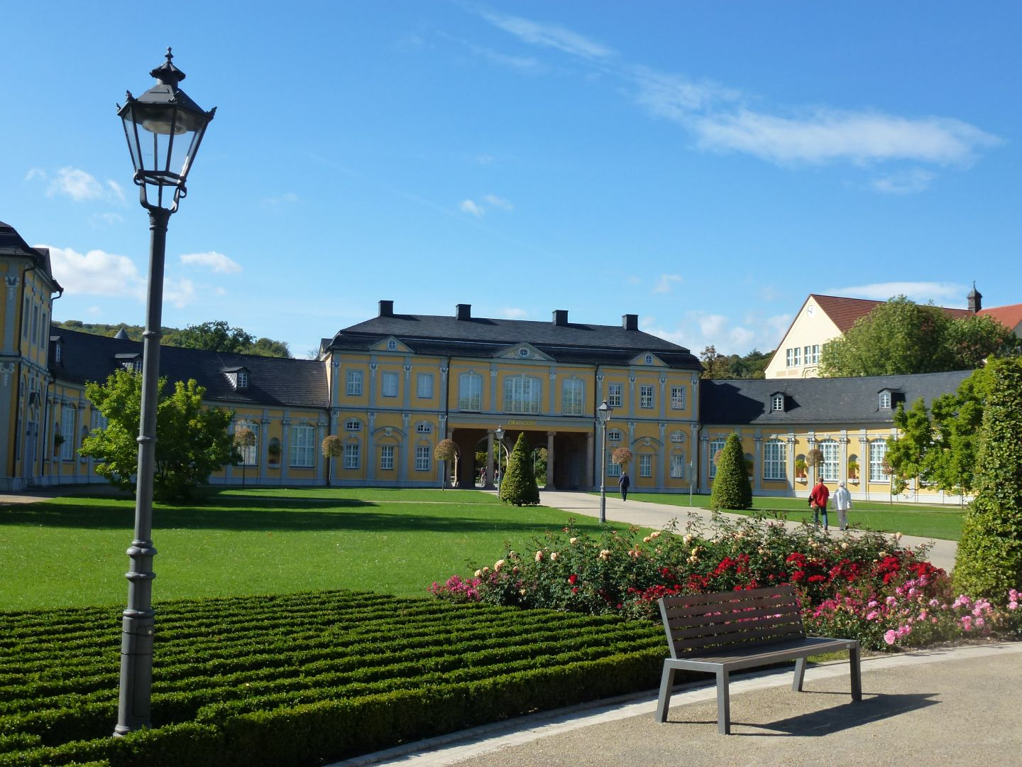 Orangerie in Gera